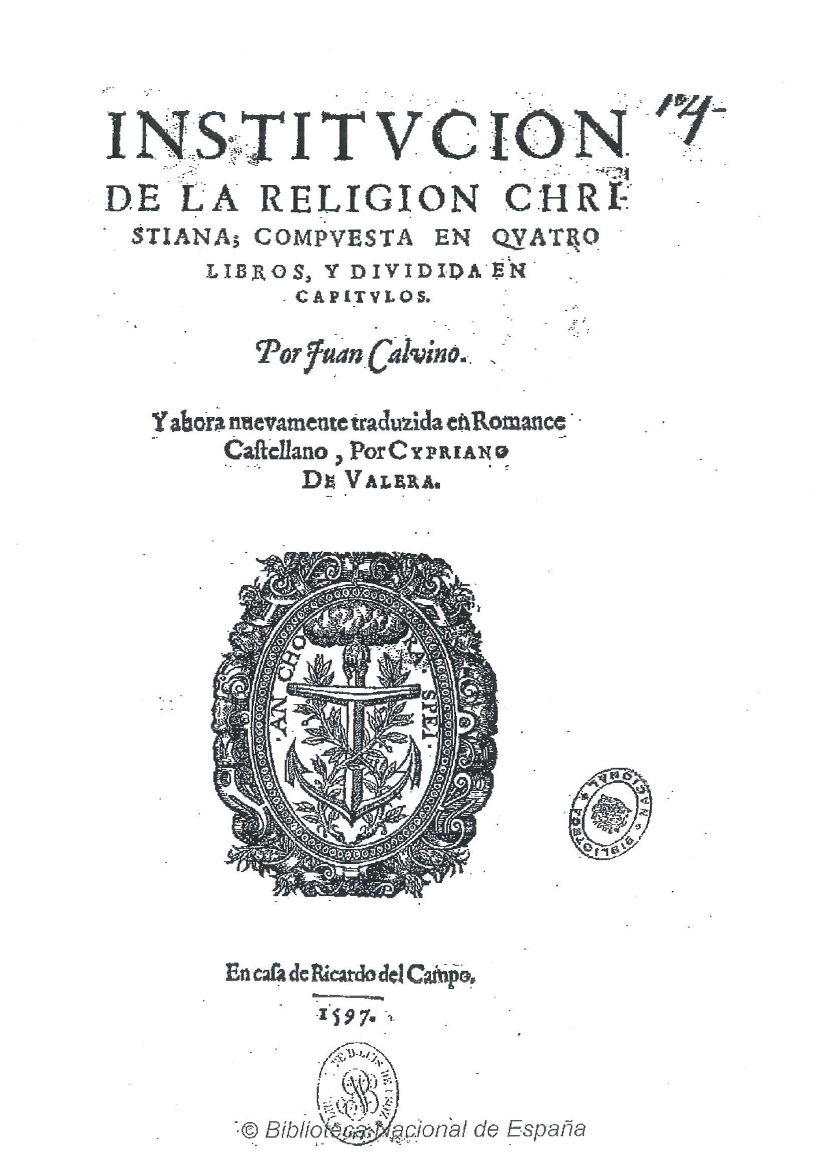 Portada de la Institución de la religión cristiana que se conserva en la Biblioteca Nacional de España.